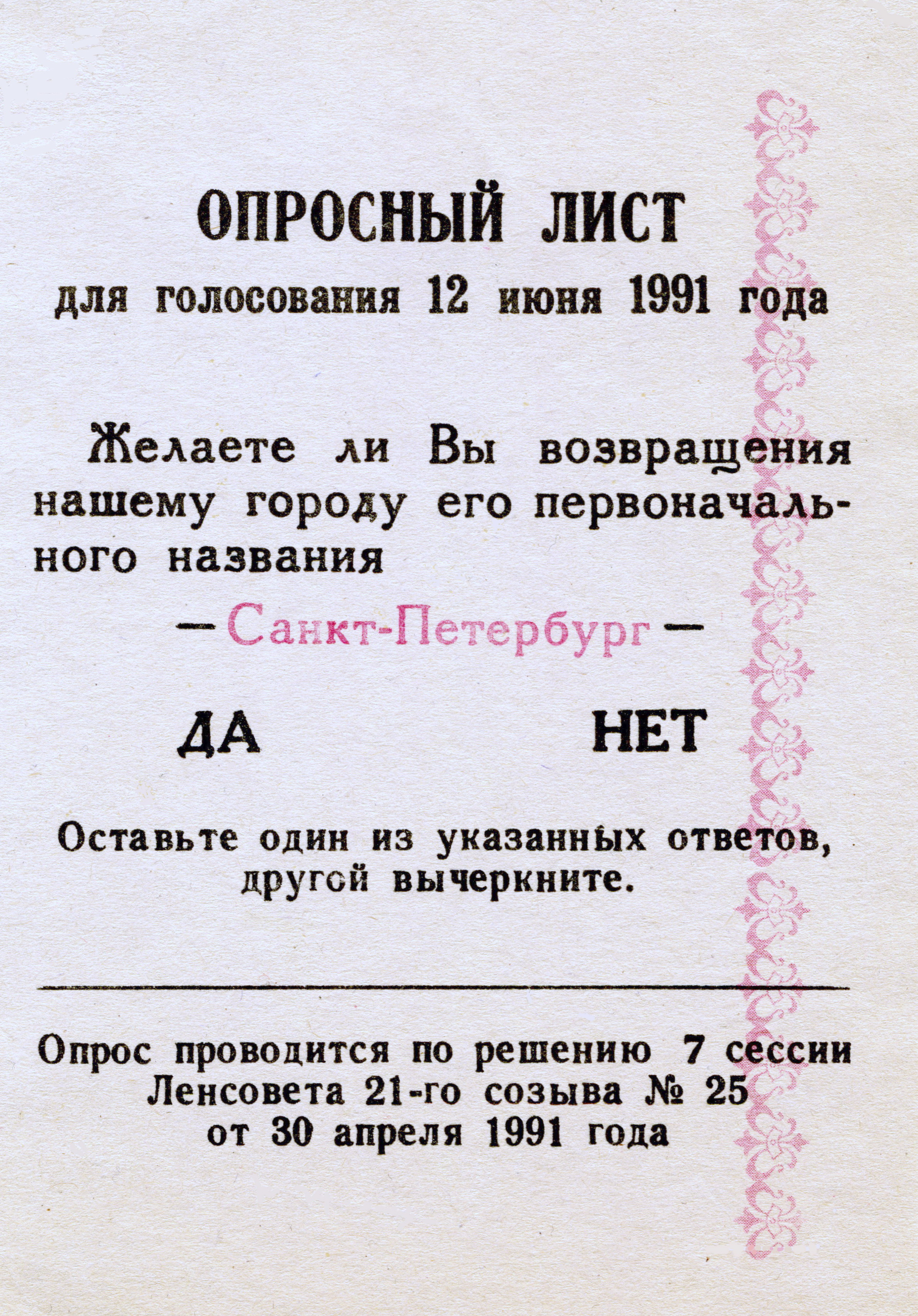 Опросный лист на городском референдуме 12 июня 1991 года по возвращению Ленинграду исторического названия — Санкт-Петербург